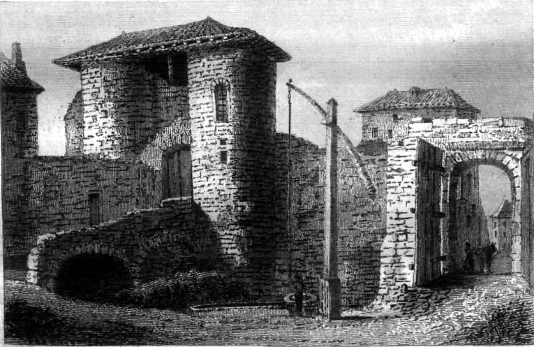 Image en provenance du livre : Eusèbe Girault de Saint-Fargeau, Guide pittoresque du voyageur en France, contenant la statistique et la description complète des quatre-vingt-six départements, orné de 740 vignettes et portraits gravés sur acier, de quatre-vingt-six cartes de départements et d'une grande carte routière de la France, par une Société de gens de lettres, de géographes et d'artistes, Paris, F. Didot frères, 1838, 6 volumes in-8° (BNF : 8-L25- 46). Volume III Didot frères, 1838. Route de Paris à Nice traversant les départements de l'Isère, des Hautes-Alpes, des Basses-Alpes et du Var. auteurs dessins : Rauch (ou autre) auteurs gravures : Skelton fils, Schroeder, Bishop (ou autre)